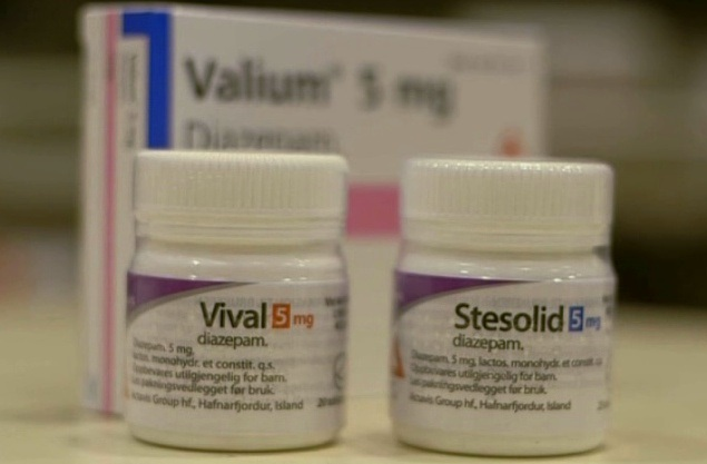 Valium, Vival og Stesolid preparater.